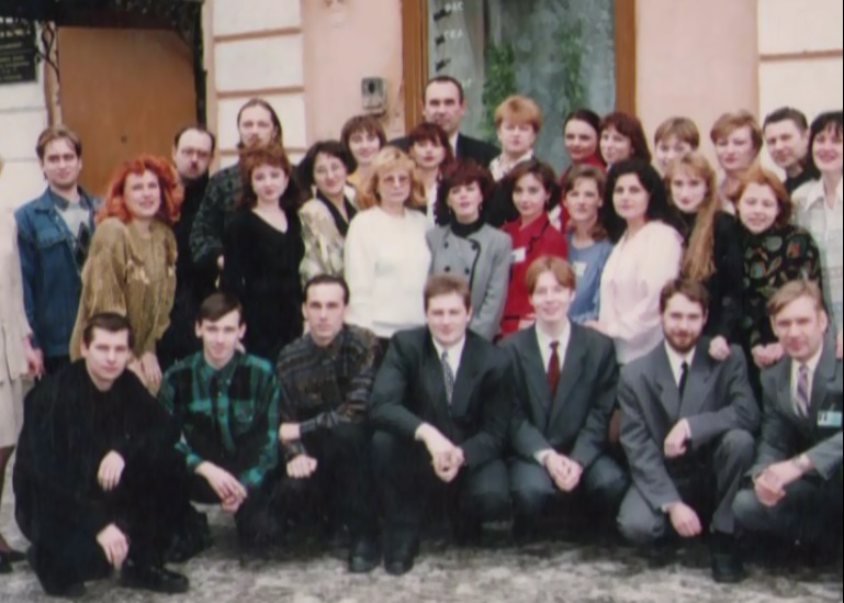 Н.А.Сысоева с коллективом телеканала "Прима", 90-е годы